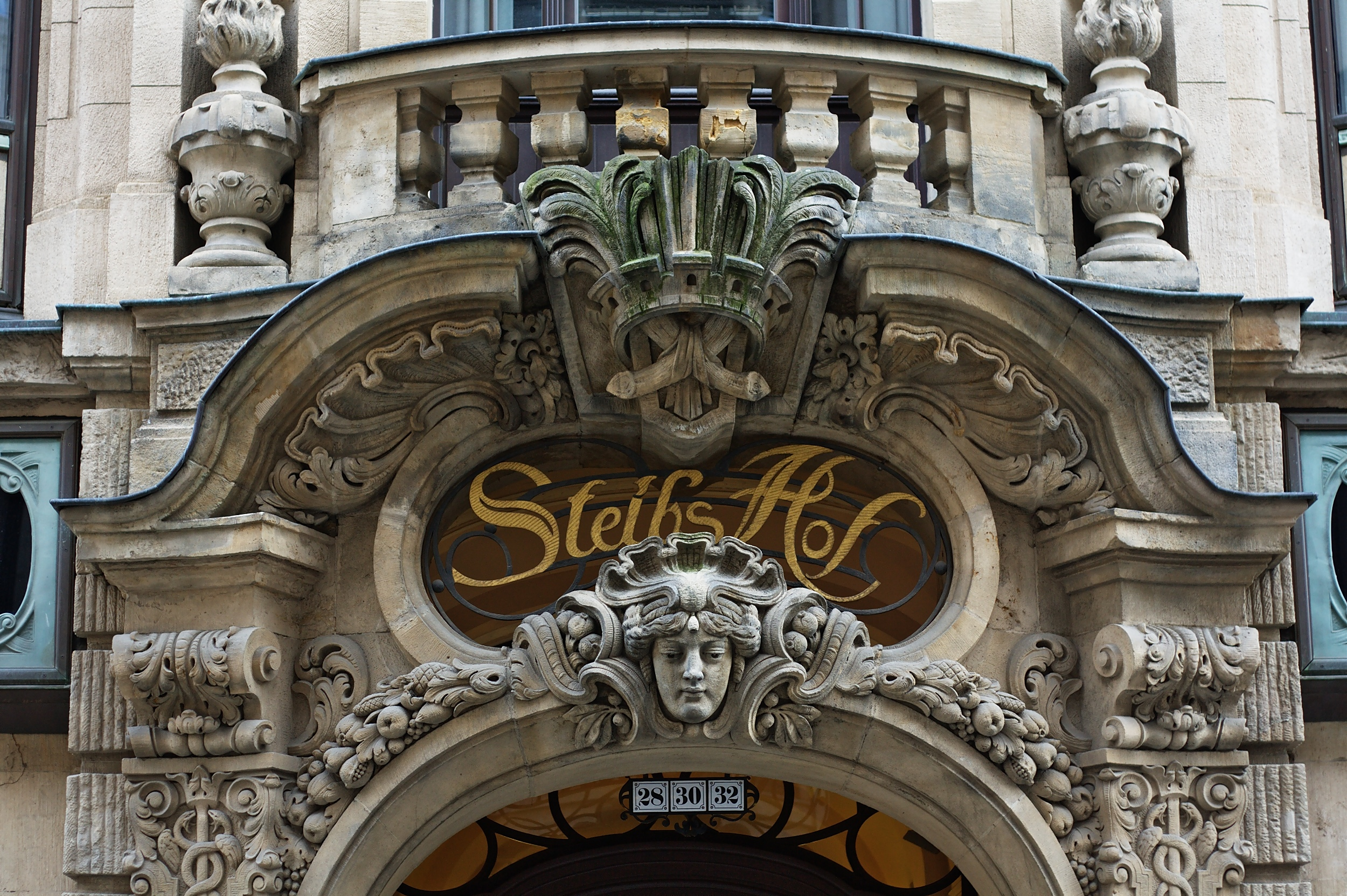 Neobarocke Verzierung über dem Eingang von Steibs Hof in Leipzig